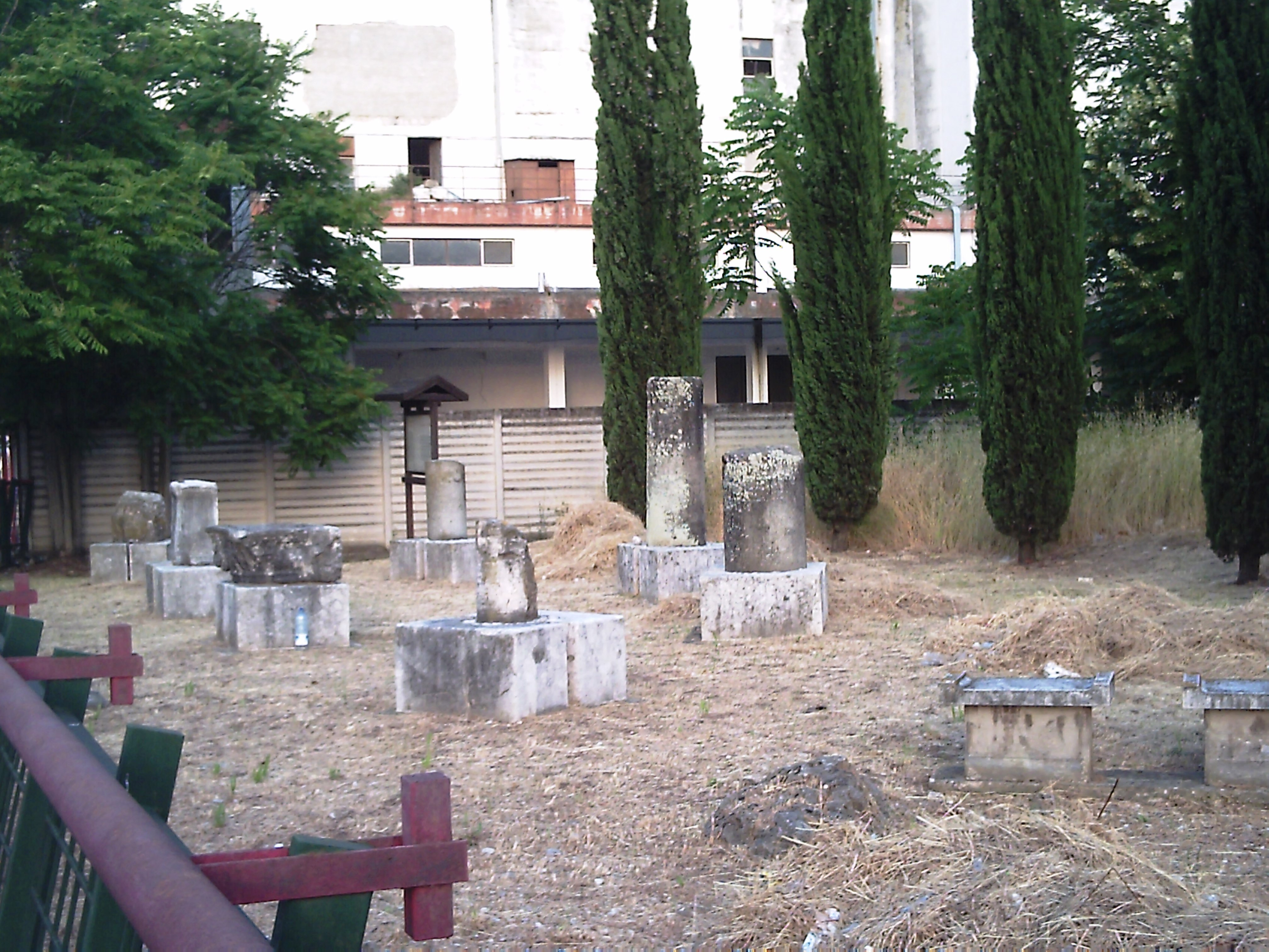 Particolare dei ruderi della Cattedrale di Telese (Bn)